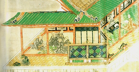 Detail van de handrol Saigyo Monogatari Emaki (1195) met een afbeelding van een penjing